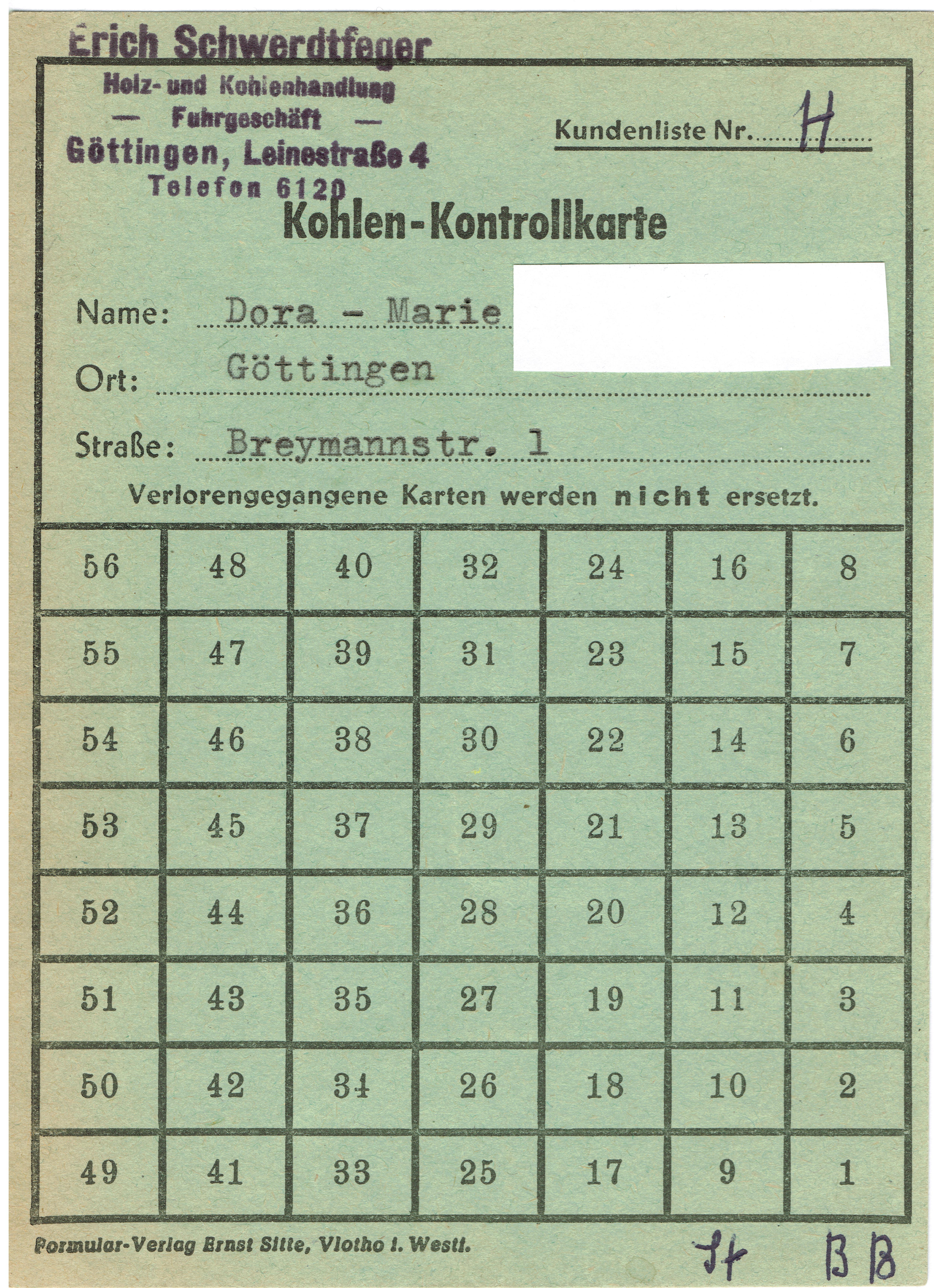 Kohlen-Kontrollkarte (Lebensmittelmarken), 1948, Göttingen